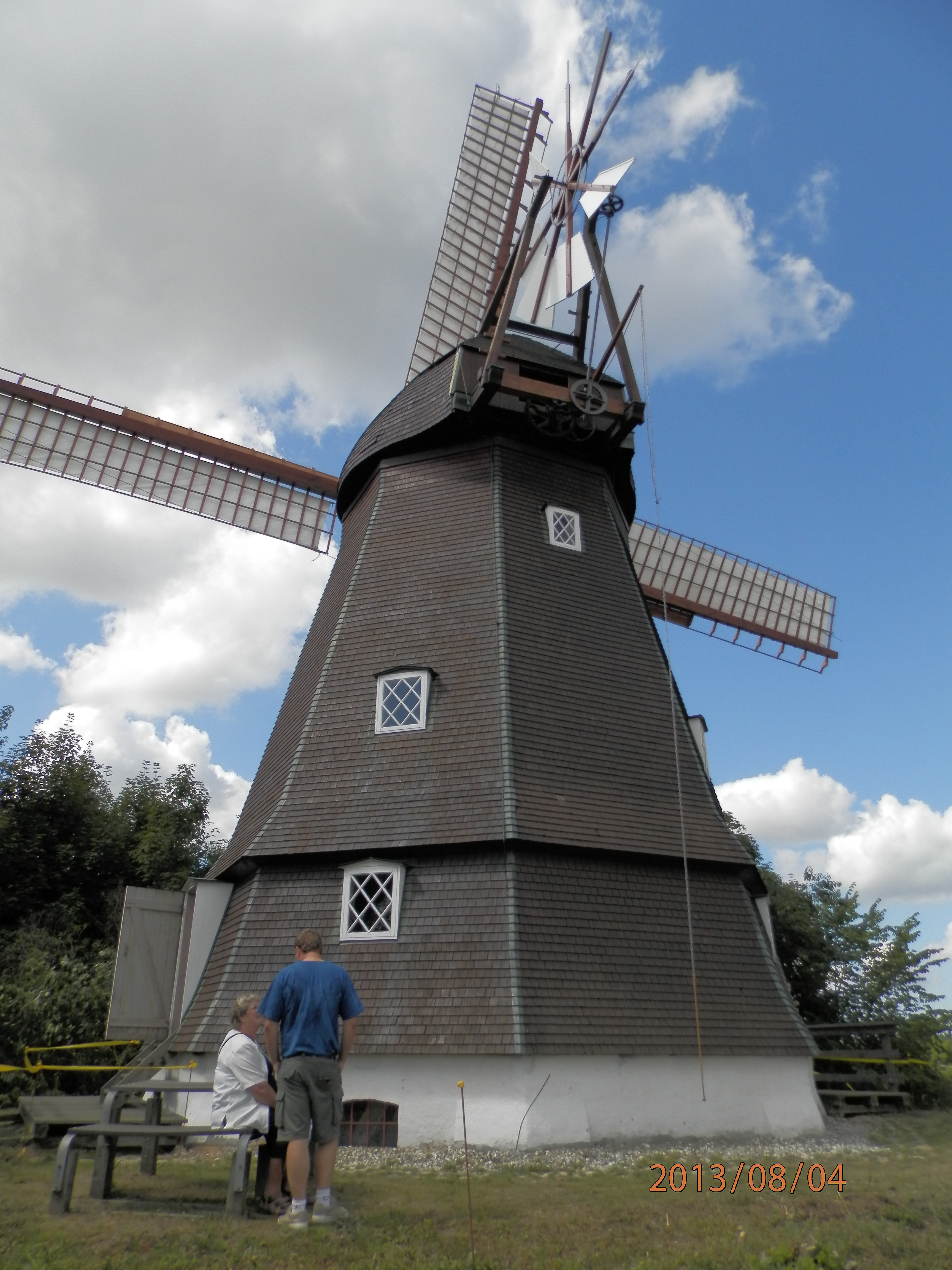 Karlebo Mølle ved indvielsen af nye vinger 4. august 2013